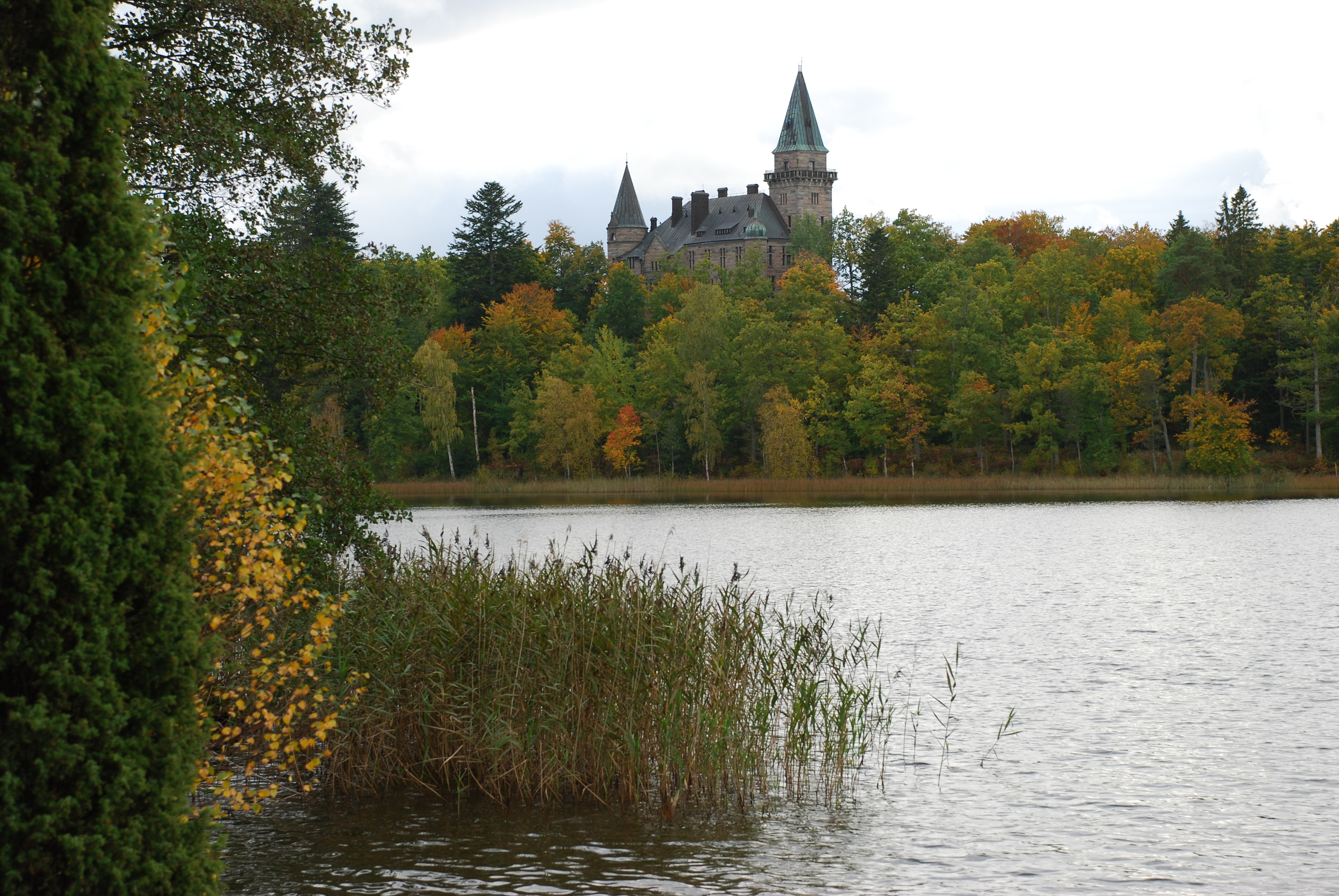 Teleborgs slott på andra sidan Trummen